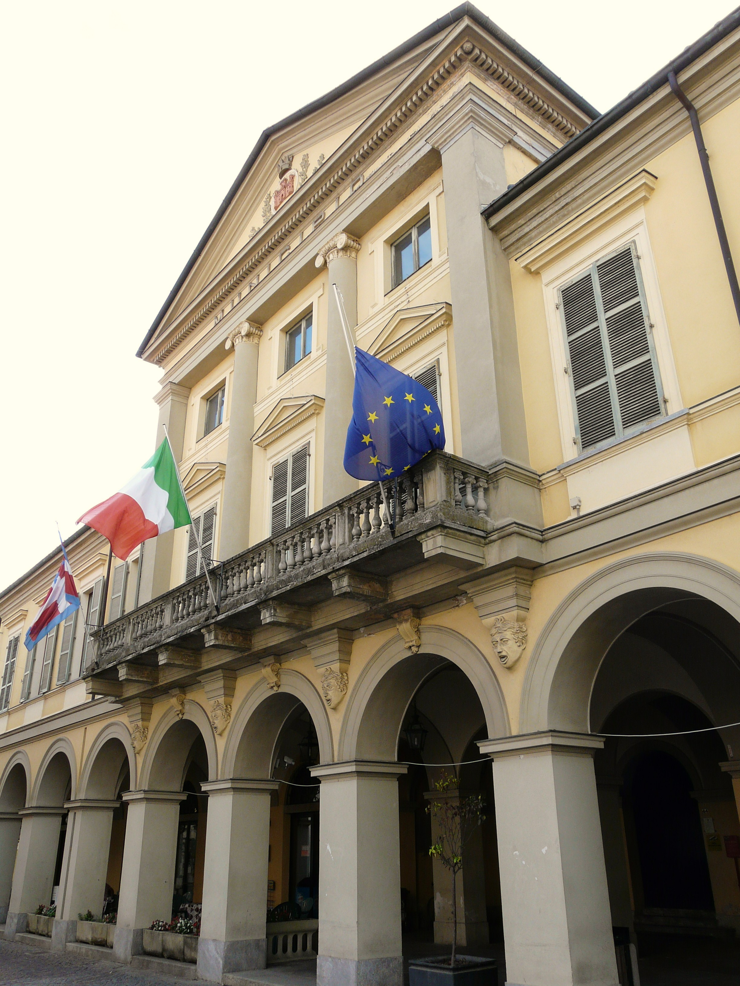 Municipio di Castellazzo Bormida, Piemonte, Italia